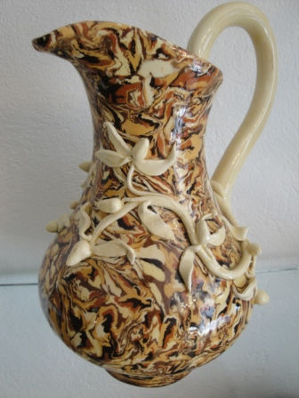 Pichet en faience jaspée (de JC Savalli)